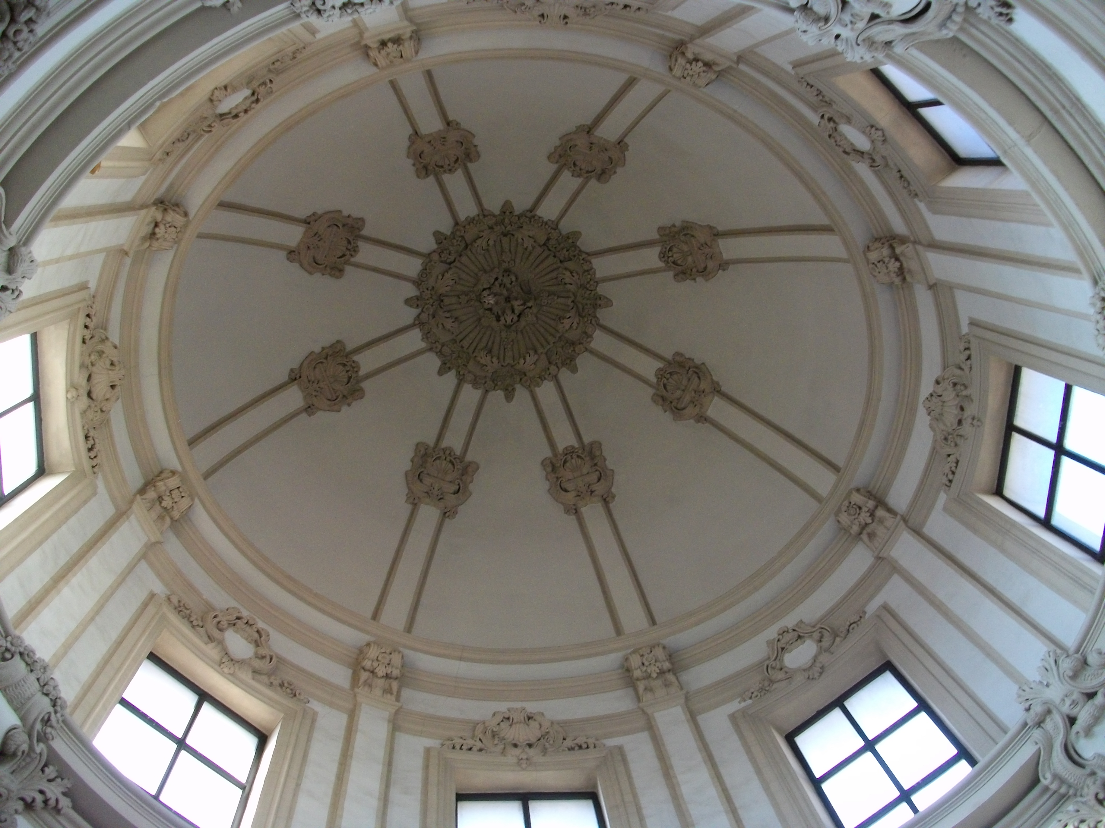 Cúpula de l'escala de L'institut Lluís Vives de València, feta el 1721.